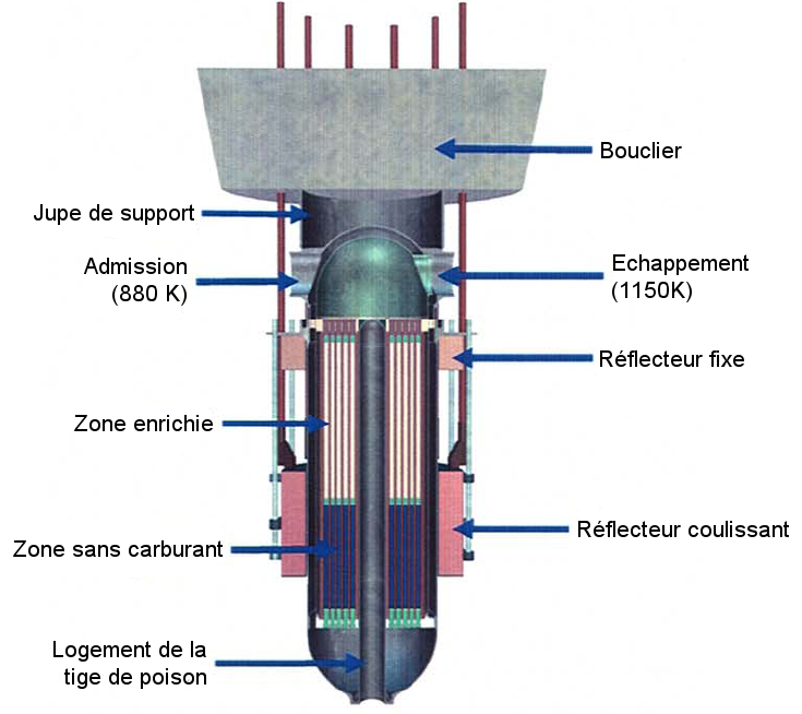 Configuration du réacteur nucléaire proposé pour la mission JIMO